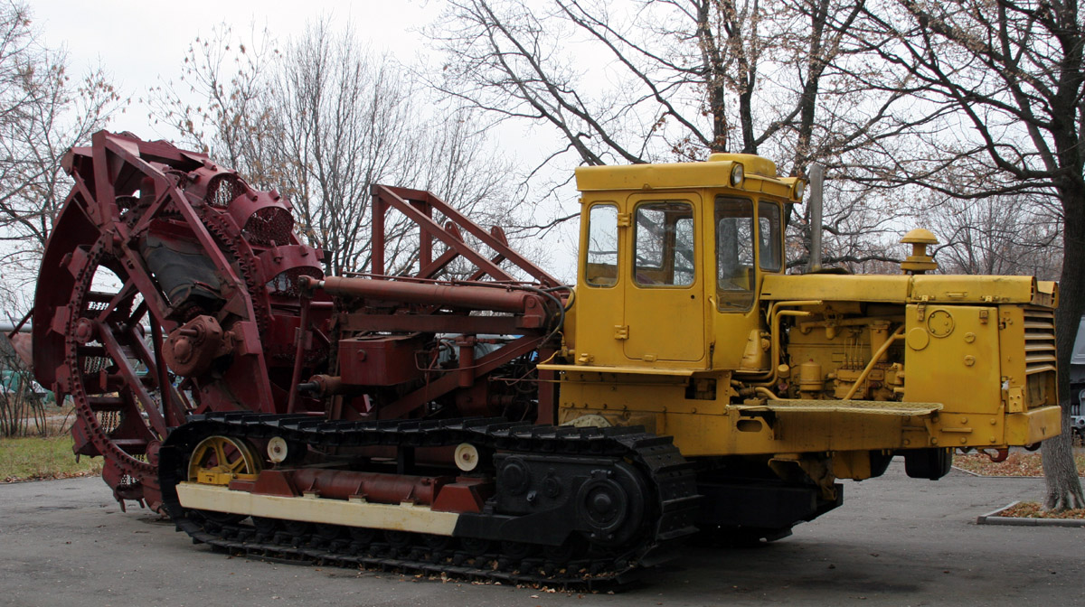 Мелиоративный экскаватор роторный траншейный ЭТР-204на базе трактора Т-130 в Саратове на Соколовой горе